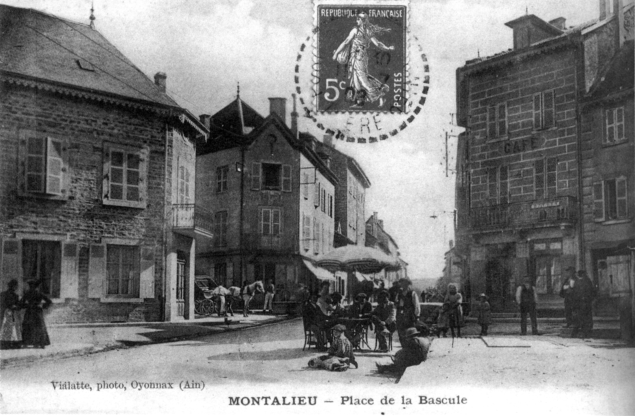 Montalieu-Vercieu, place de la bascule à Montalieu en 1908